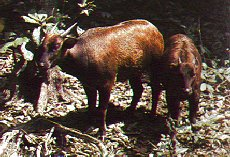 Anoa Pegunungan